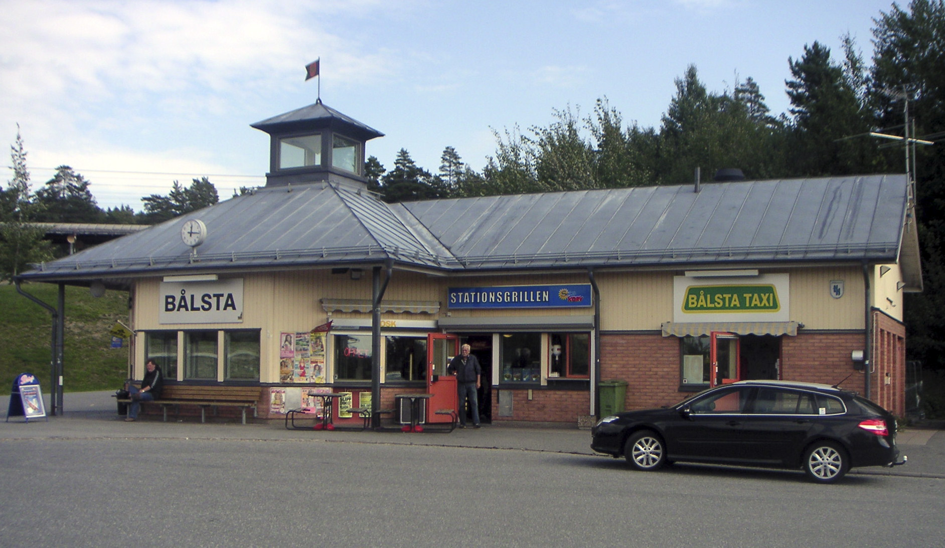 Bålsta järnvägsstation